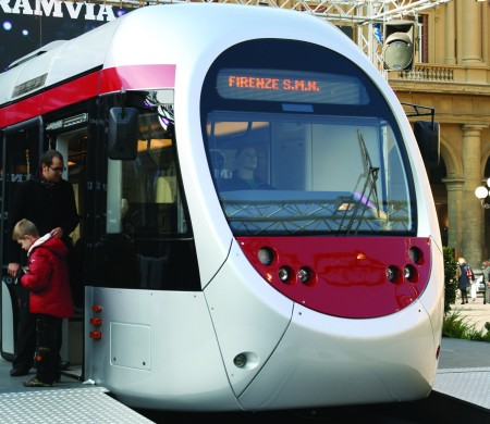 tramvia di firenze vettura sirio